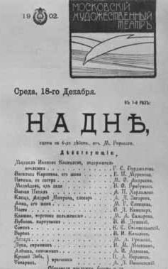 Афиша пьесы «На дне»